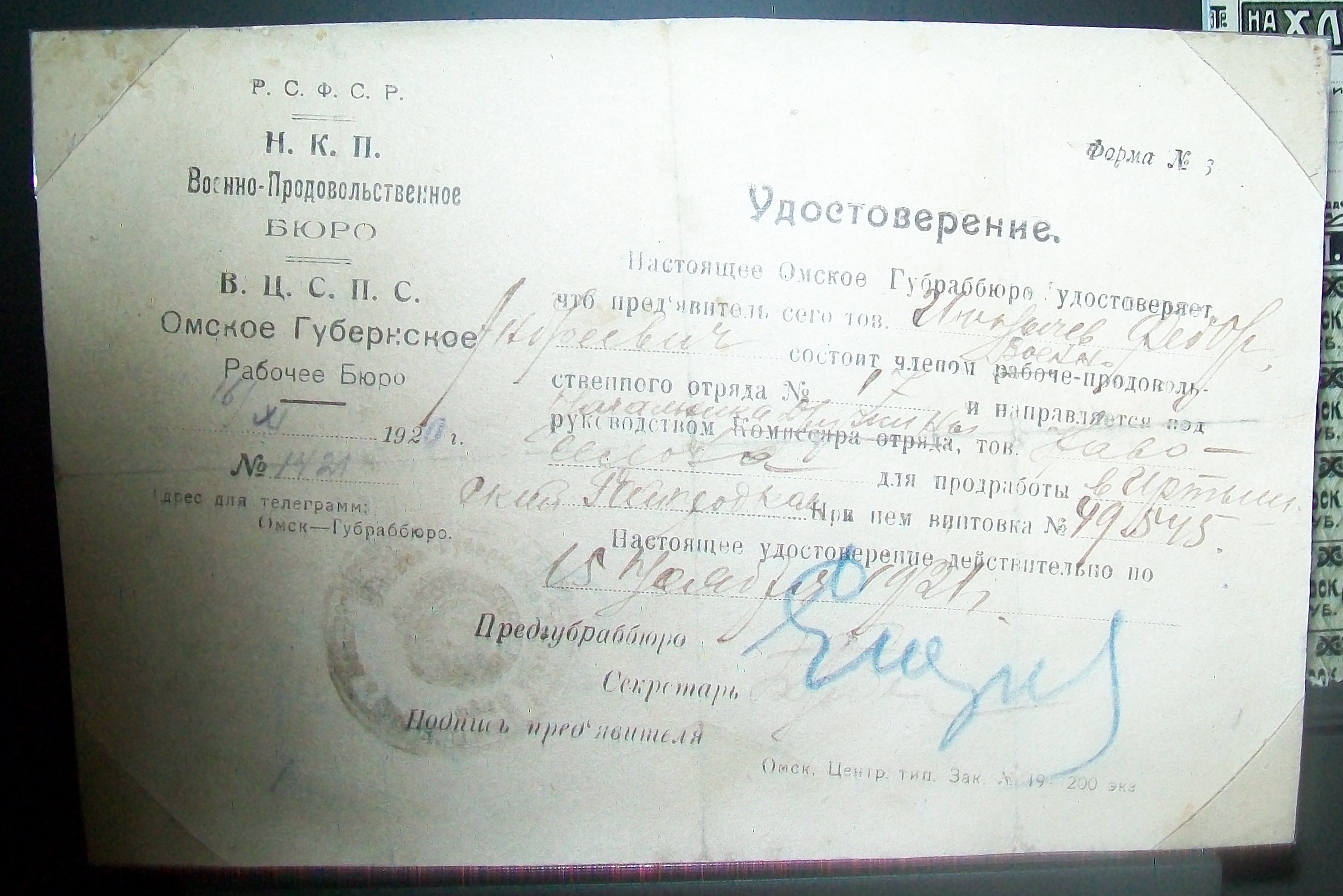 Удостоверение члена продовольственного отряда, выданное 16 ноября 1920 года. Фото документа, находящегося в музее Б.Н. Ельцина в Ельцин-центре